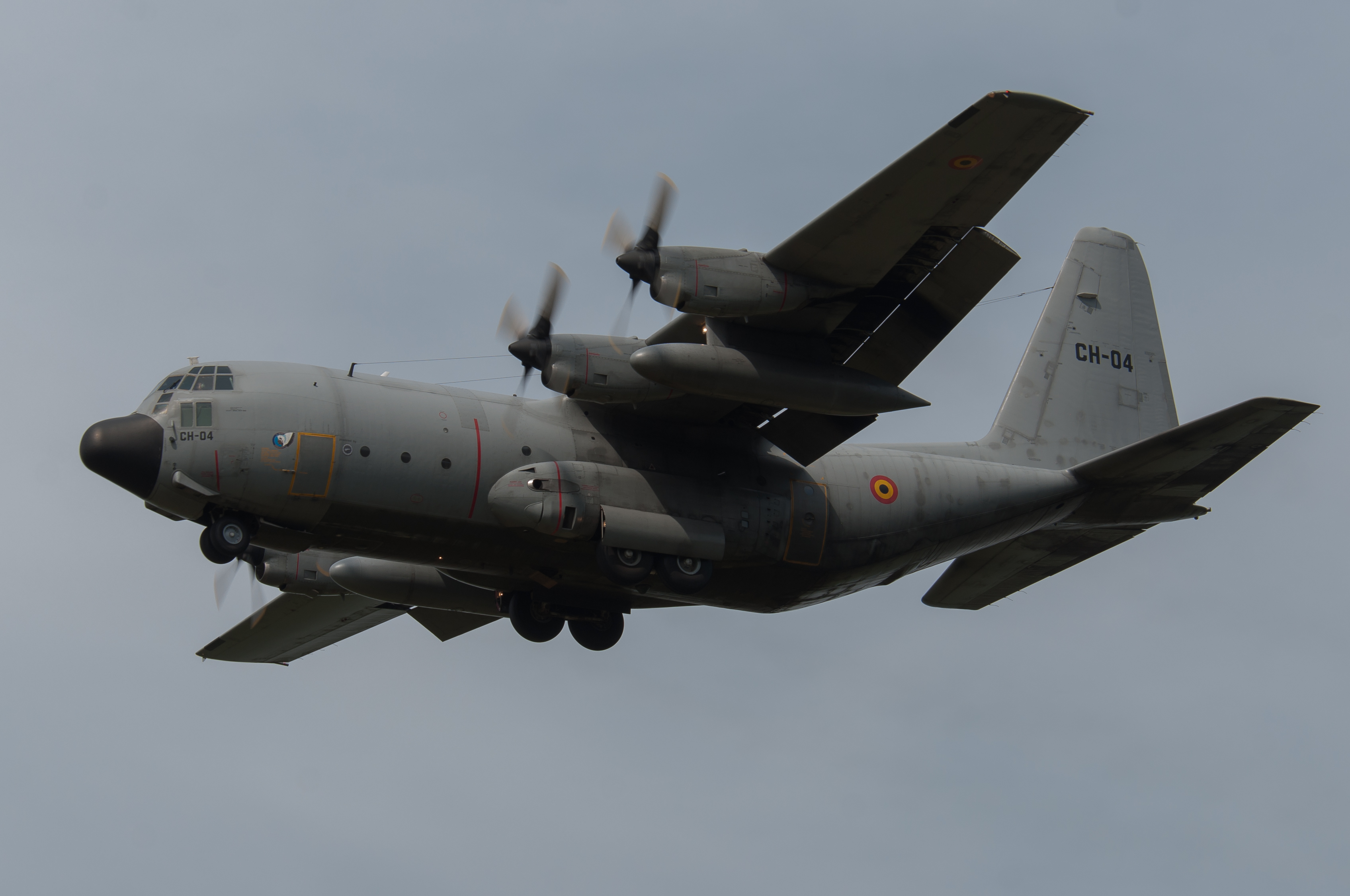 CH-04